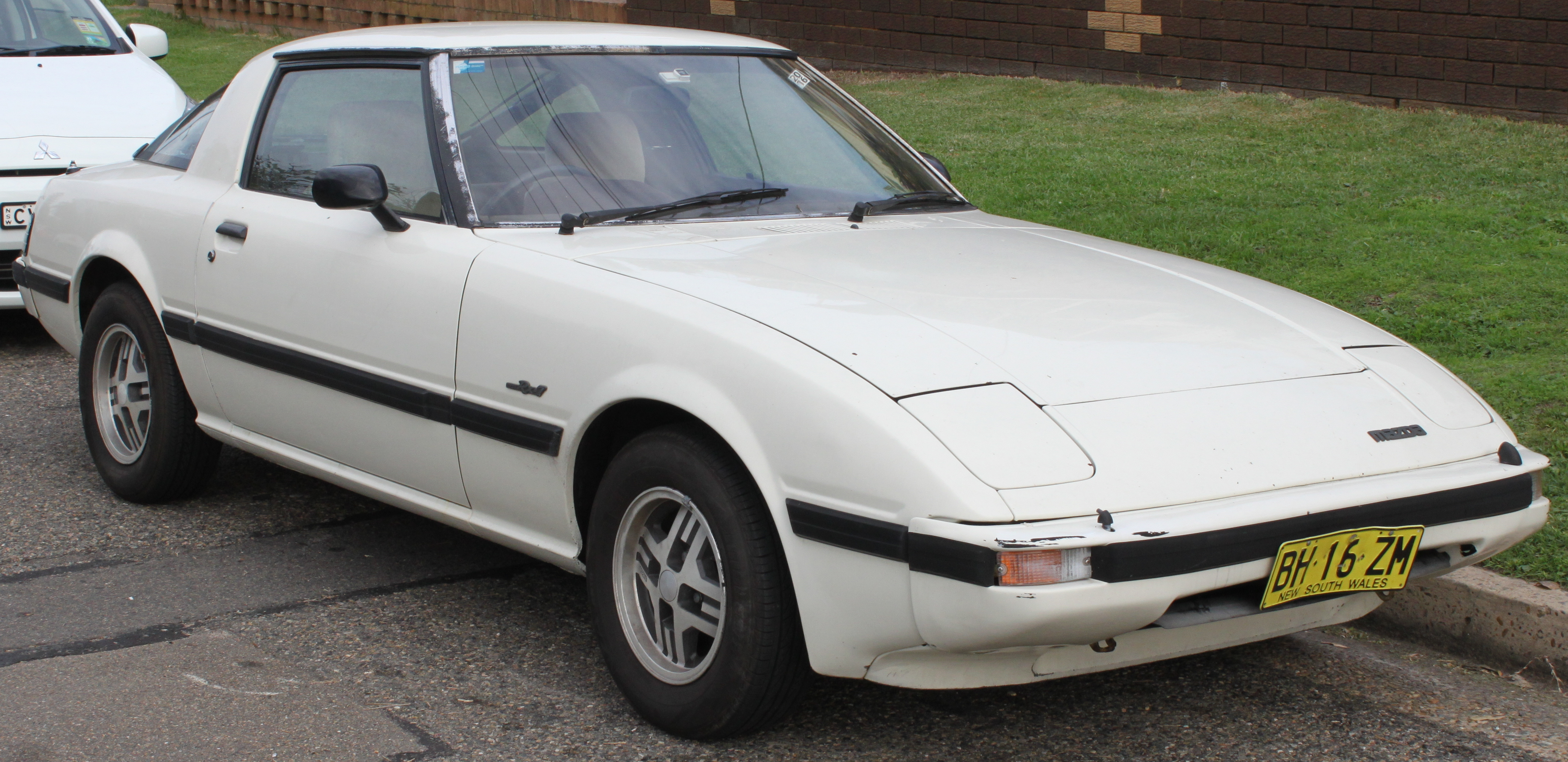 Mazda RX-7 Series II